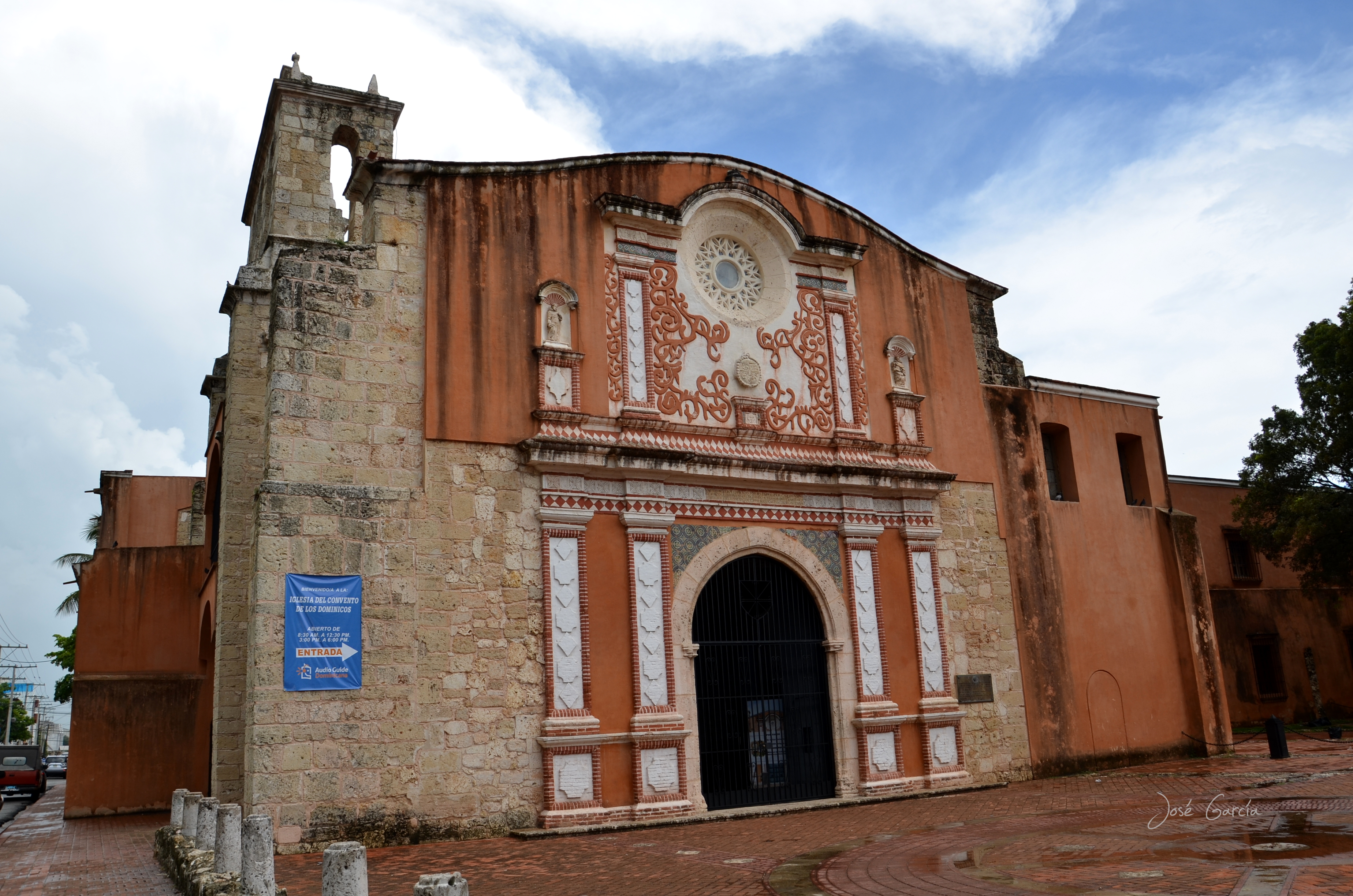 Convento e Iglesia de los Dominicos, Ciudad Colonial de Santo Domingo, República Dominicana.